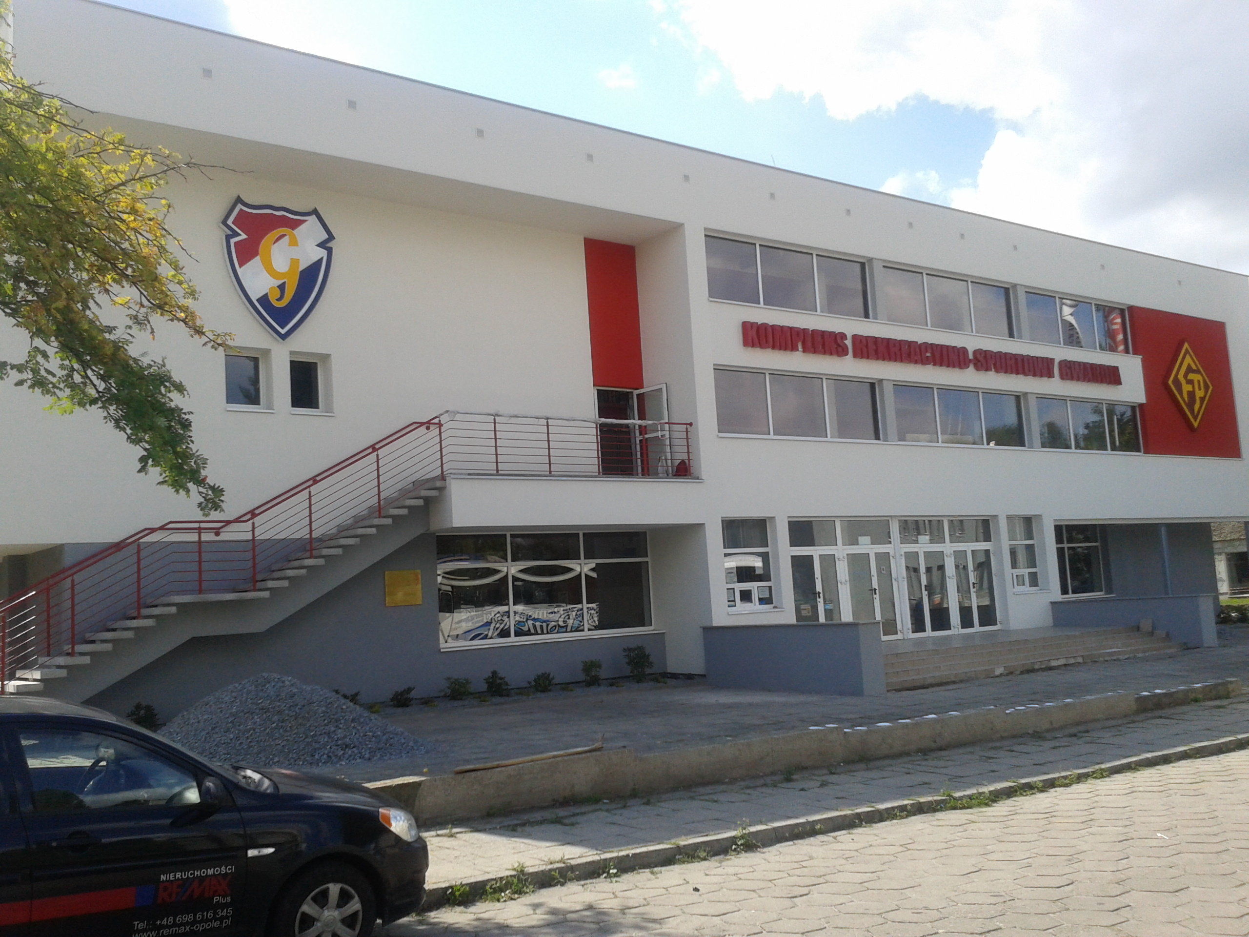 Hala Gwardii Opole